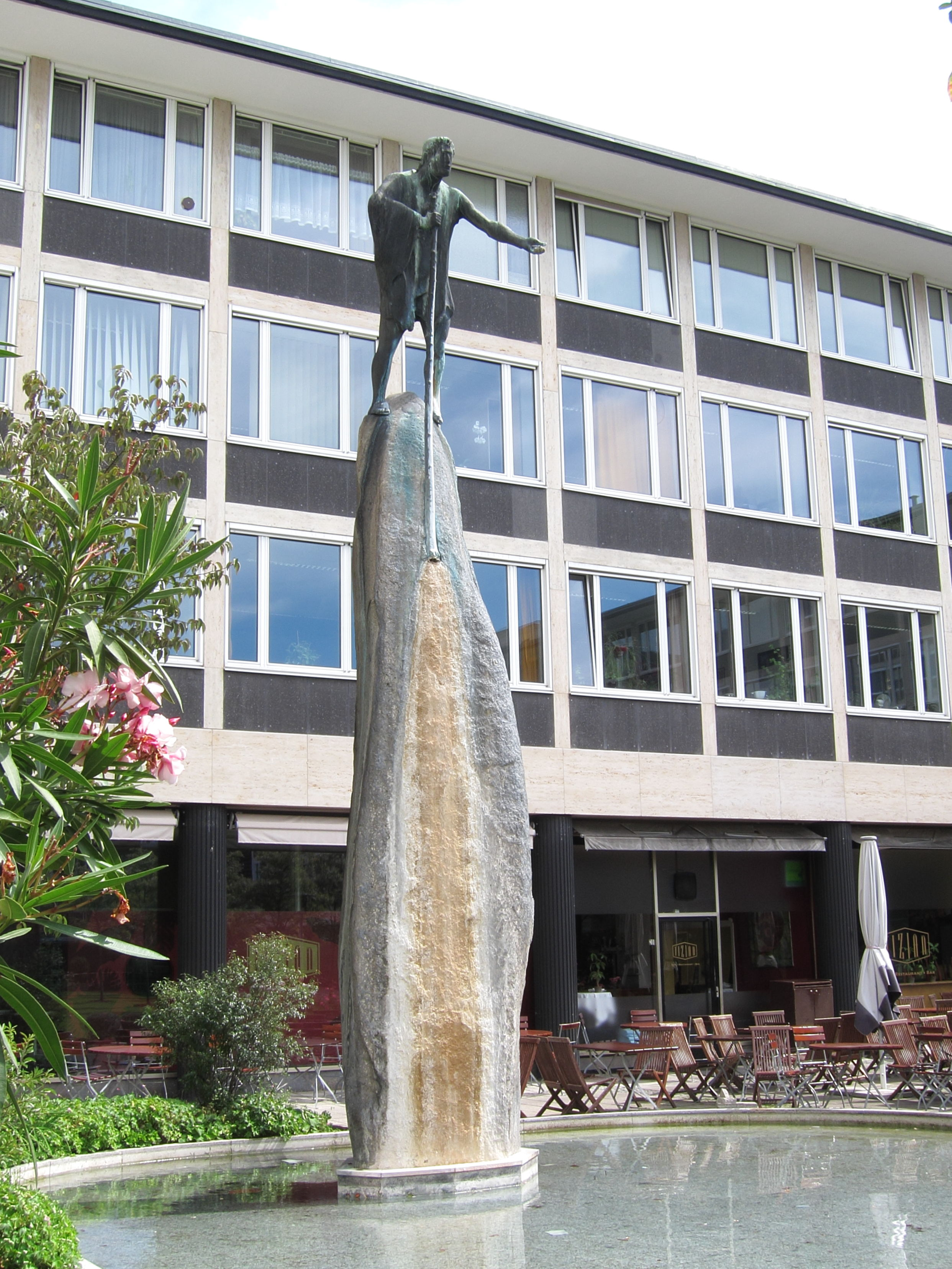 Mosesbrunnen im Innenhof der Maxburg, Bronzefigur auf Findling, von Josef Henselmann, 1954